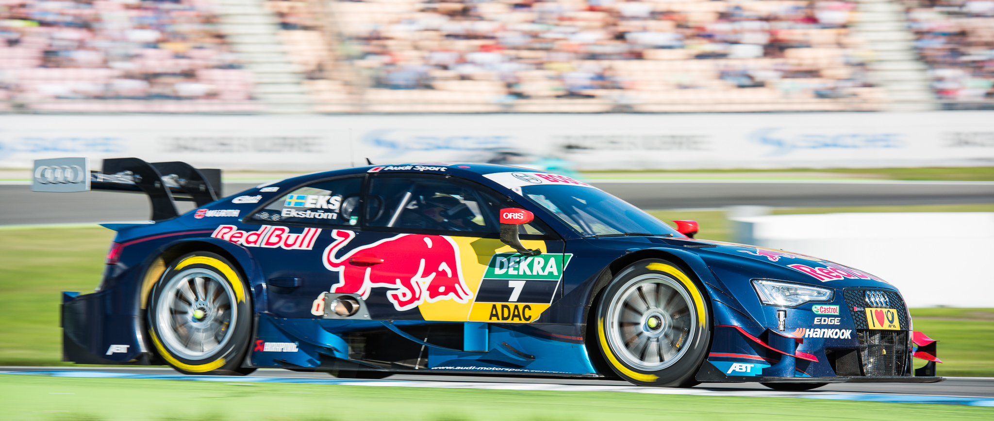 Abt Sportsline GmbH,DTM,Deutsche Tourenwagen Masters,Hockenheimring,Mattias Ekström,Motorsport,Red Bull Audi RS 5 DTM